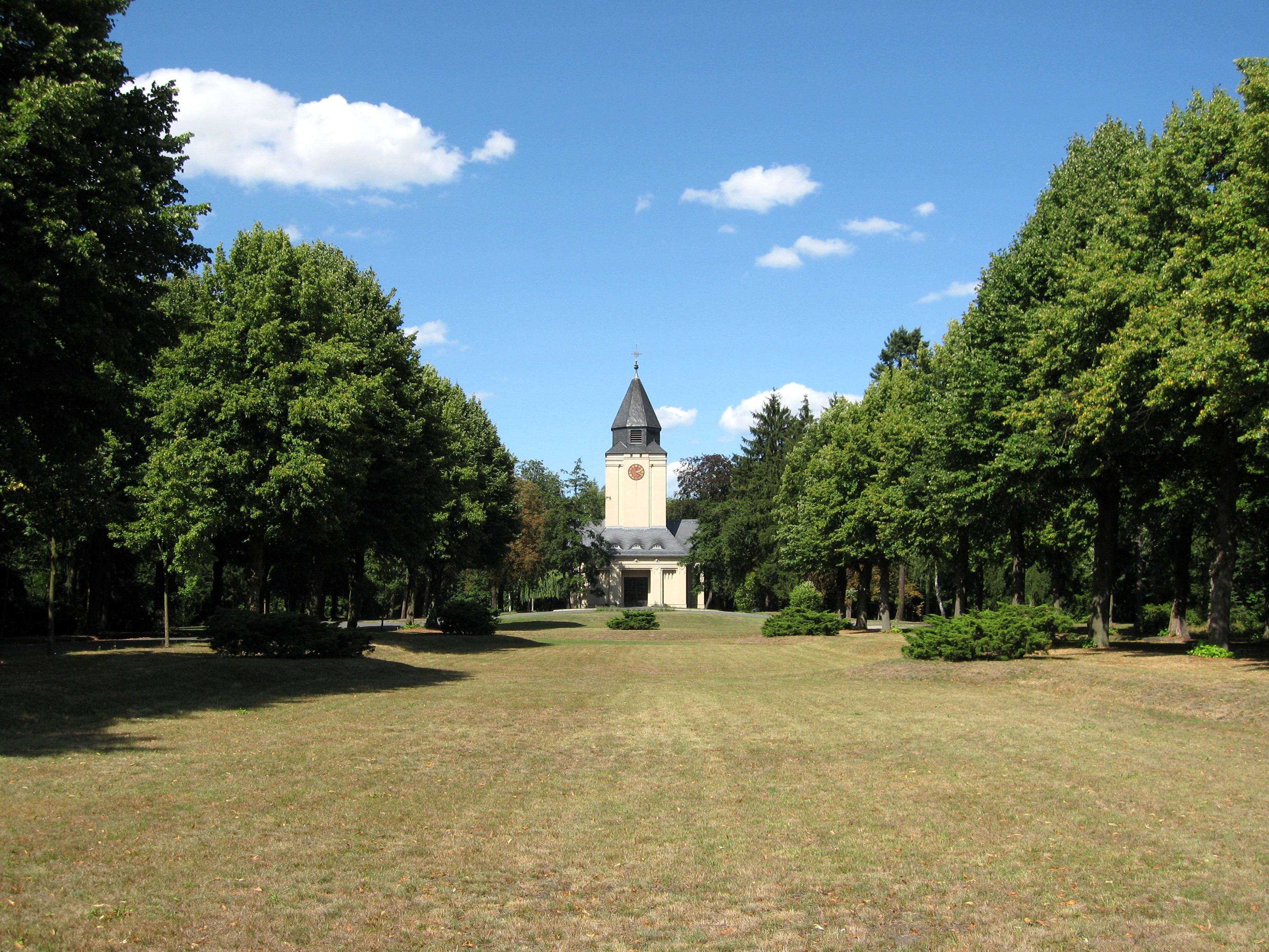 Kapelle des Ostkirchhofs Ahrensfelde, Landkreis Barnim, Land Brandenburg, Deutschland